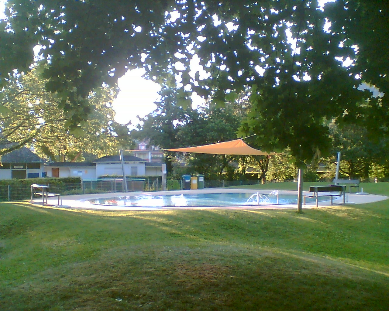 Plansch- und Kinderbecken des Lorettobades in Freiburg im Breisgau, dahinter befindet sich das baulich abgetrennte Damenbad